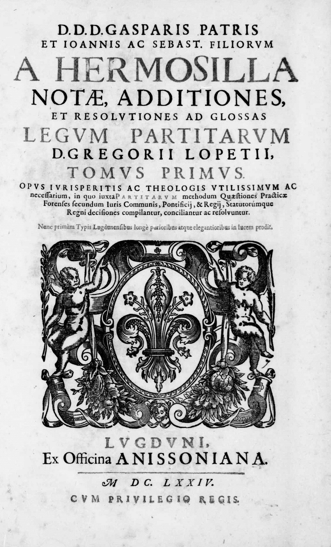 Frontespizio